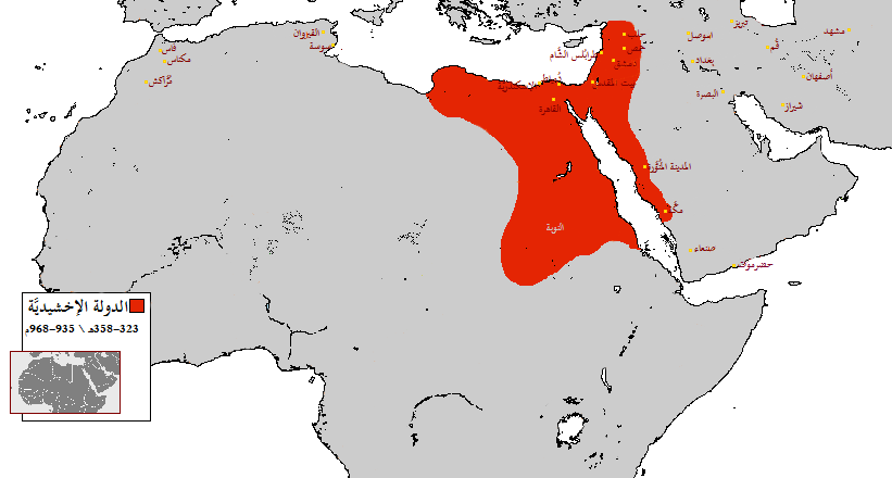 خارطة تُظهر حُدود الدولة الإخشيديَّة في أقصى اتساعها.